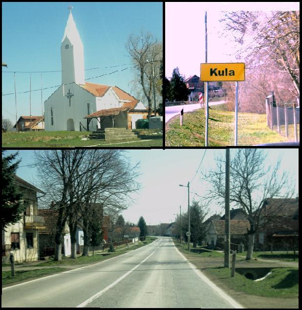 Selo Kula kod Kutjeva, njemački naziv Josefsfeld